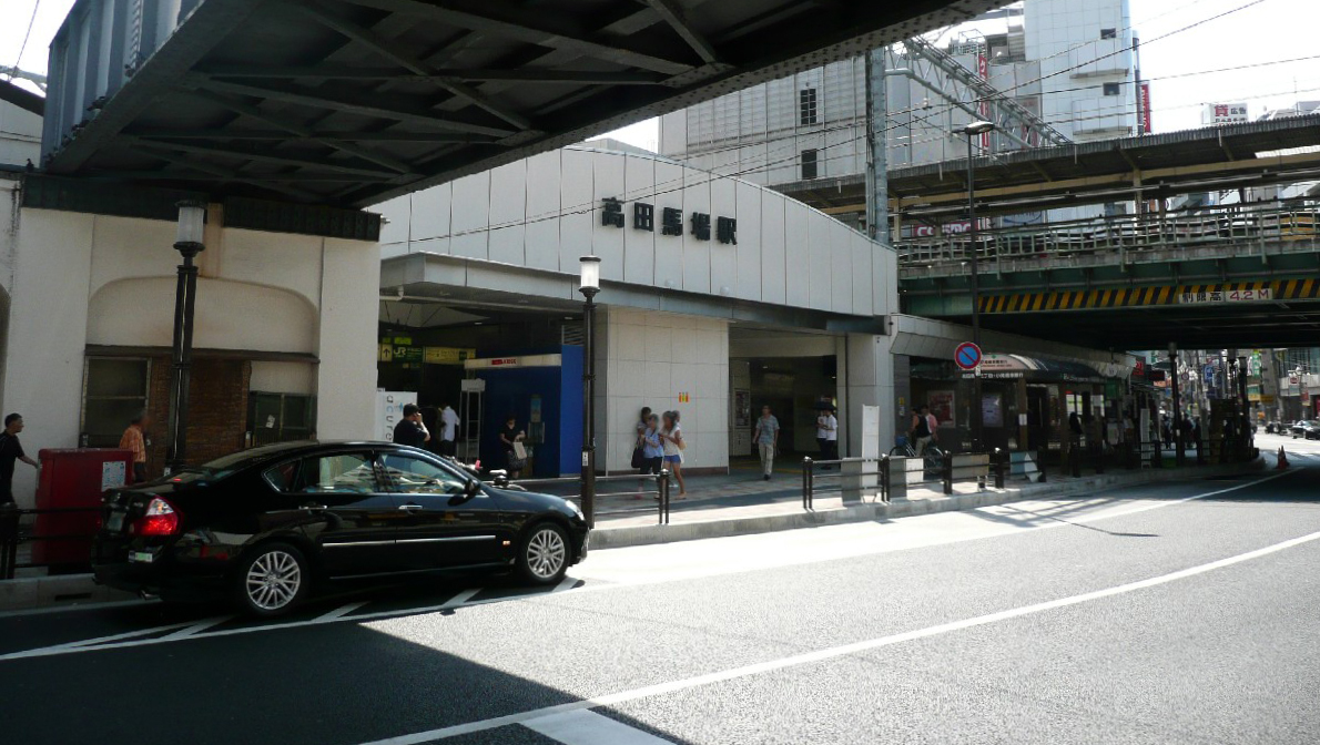 高田馬場駅早稲田口